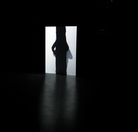 Installationansicht der Videoinstallation Linie von Johanna Reich